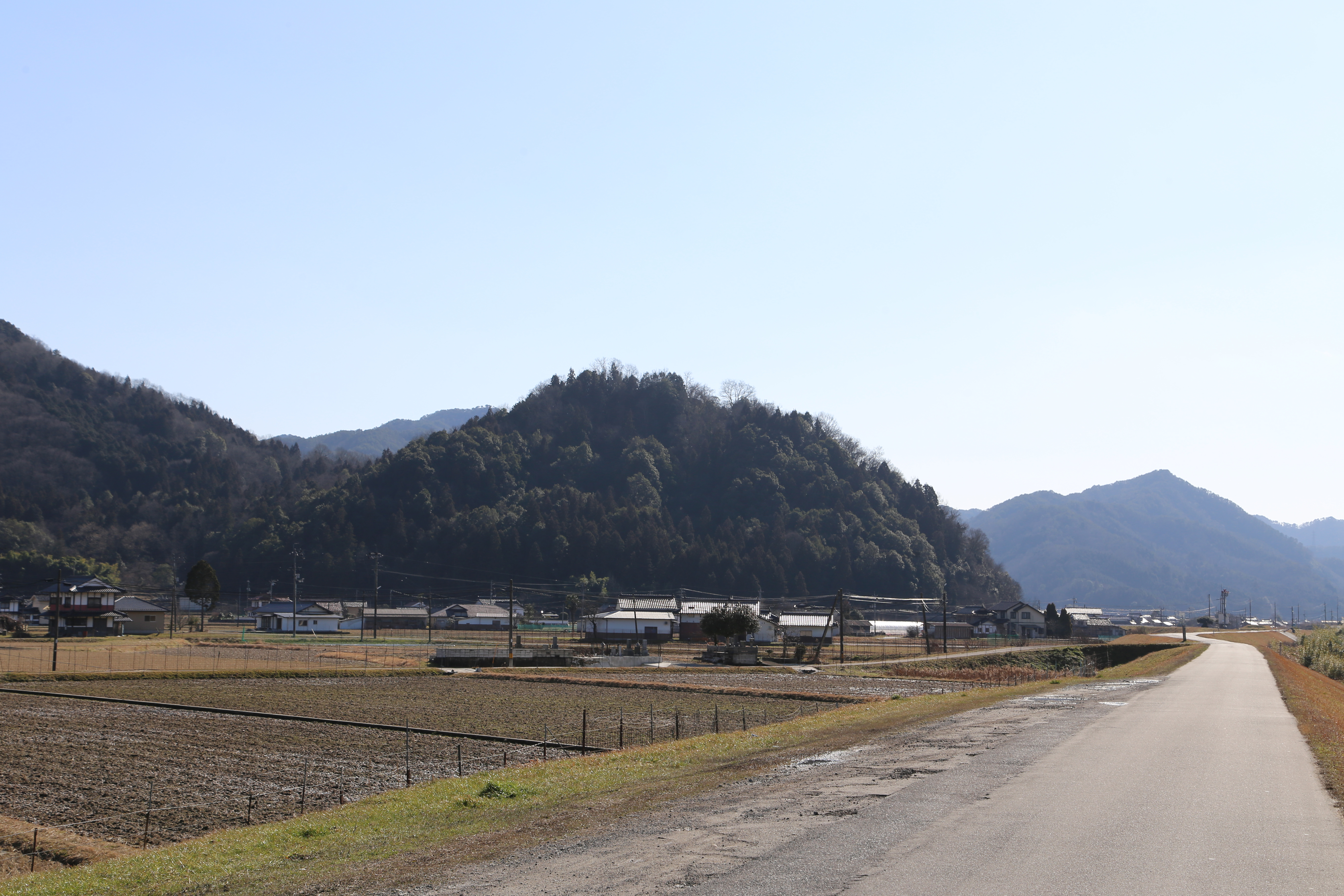 安芸国鈴尾城遠景